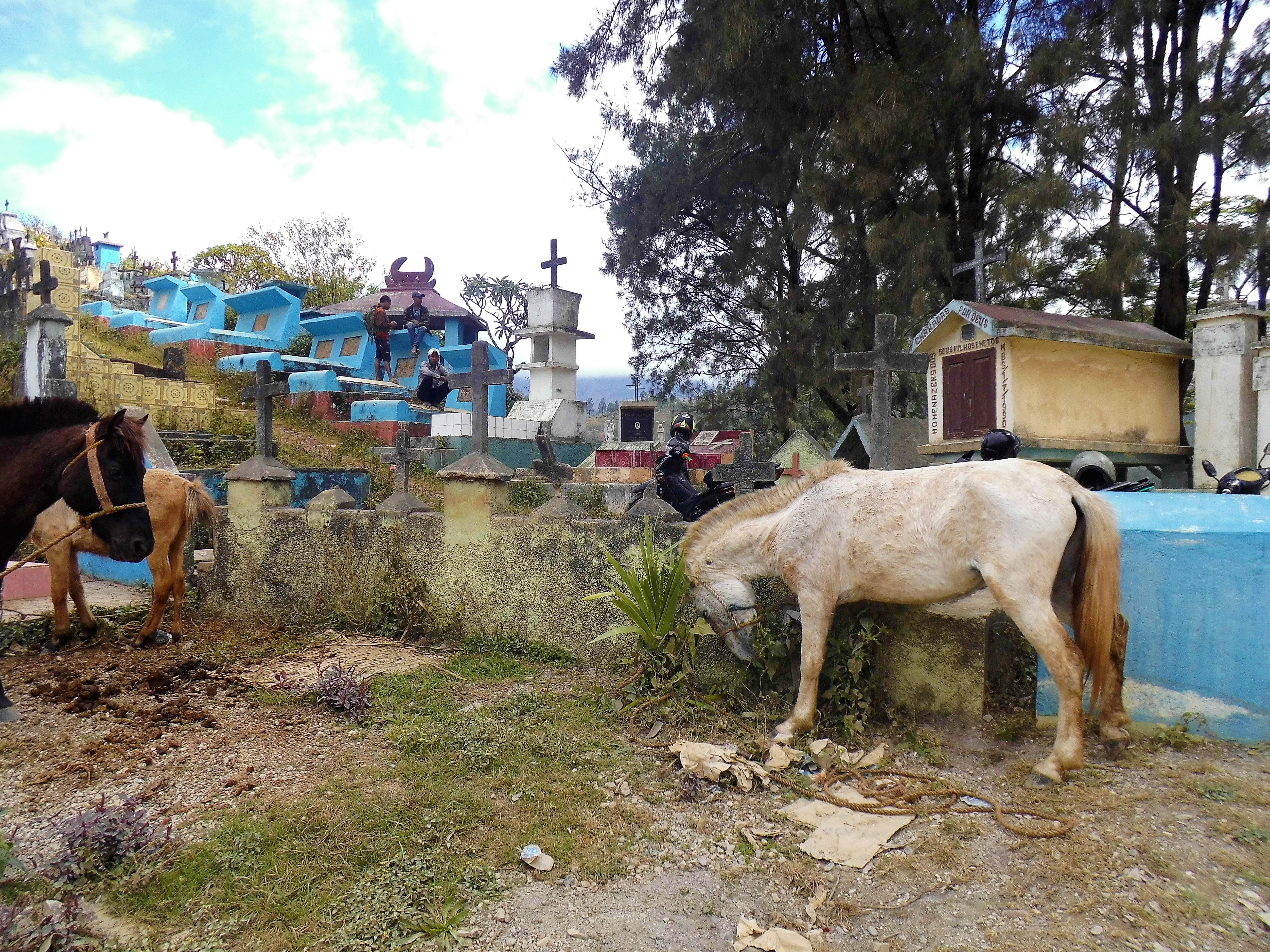 Maubisse